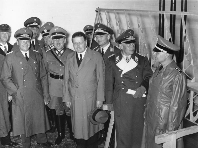 Feierliche Übergabe des vom Reichspostministerium ausgebauten Jungfliegerheims in Zeesen durch den Reichspostminister an den Korpsführer des NSFK. Beim Rundgang durch das neue Jungfliegerheim. von links: Staatssekretär General der Flieger Milch, Staatssekretär im Reichspostministerium Dipl.Ing. Nagel, Reichspostminister Dr. Ing. e.h. Ohnesorge und der Korpsführer des NSFK Generalmajor Christiansen. Photo Zoll; Scherl 7824-37